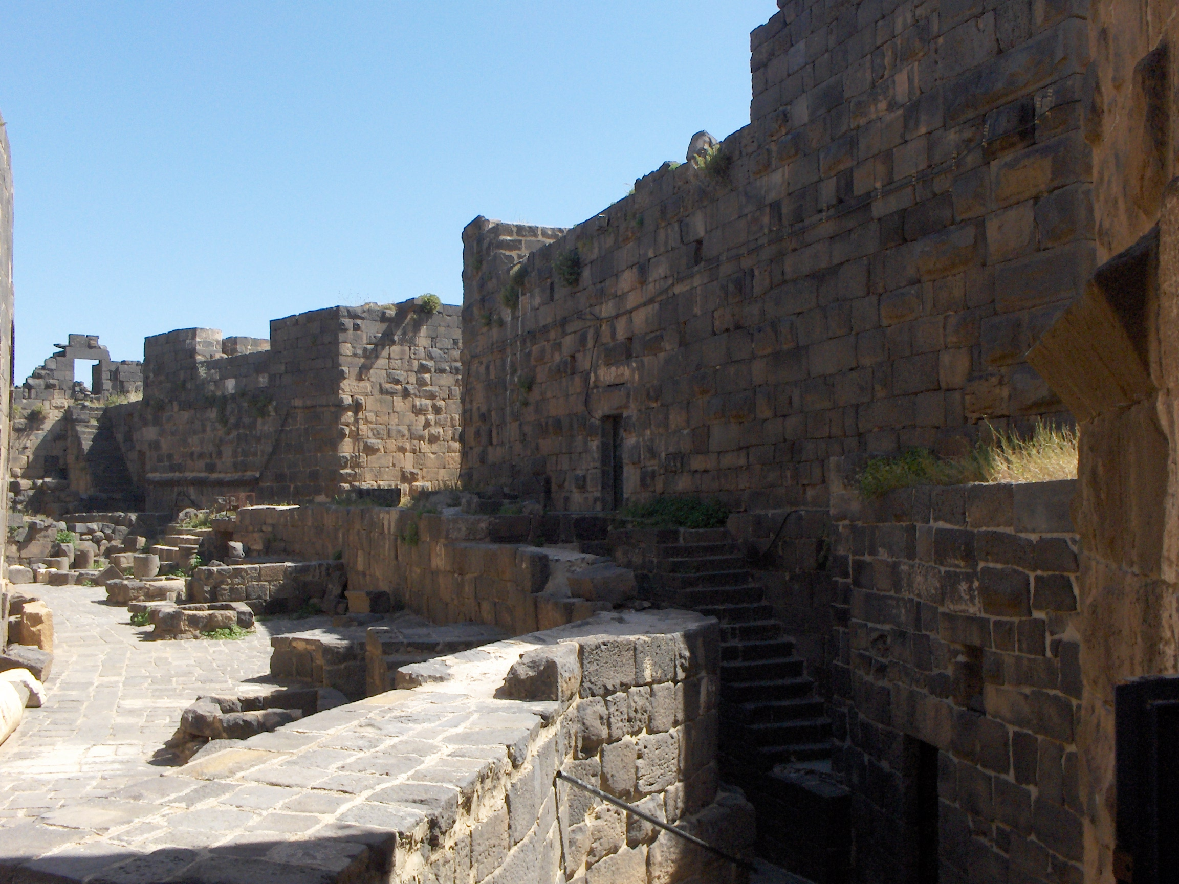 Spalti della cittadella costruita attorno al teatro di Bosra, Siria